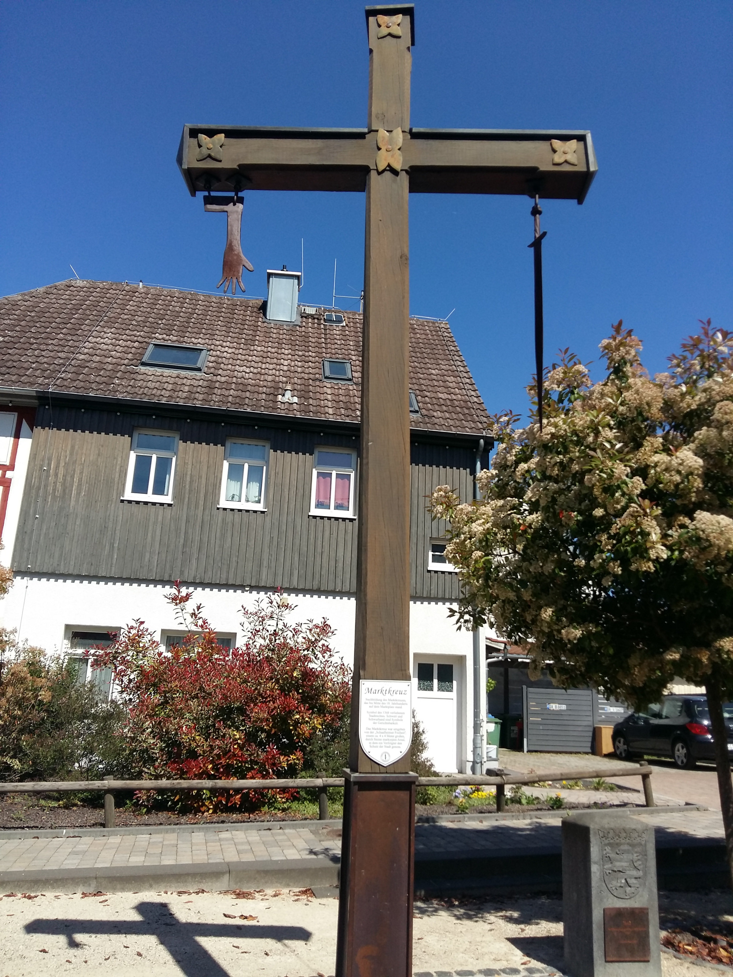 Historisches Marktkreuz von Schaafheim in der Friedrich-Ebert-Straße von Westen (Mai 2020).